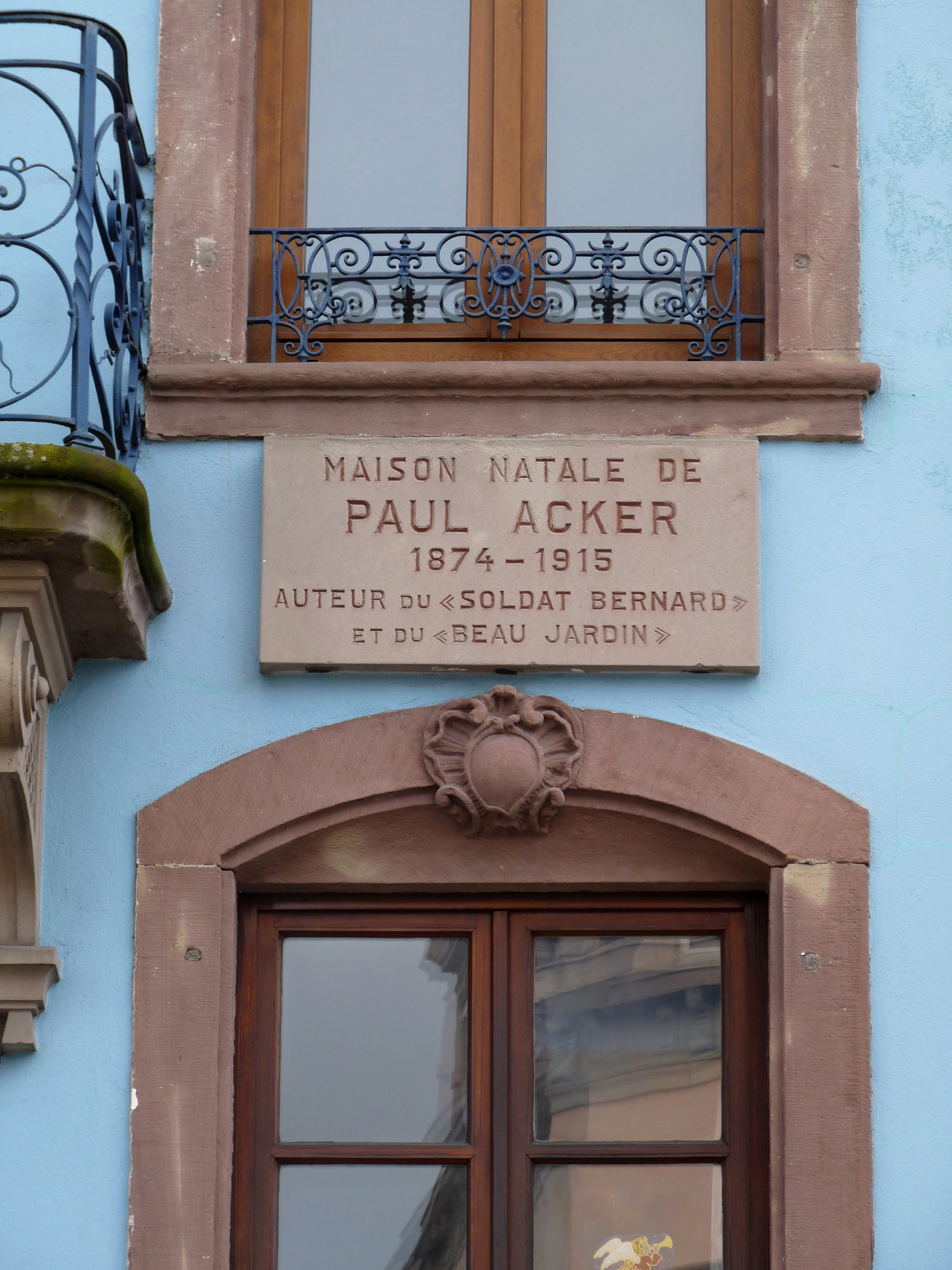 Plaque commémorative sur la maison natale de Paul Acker à Saverne (Bas-Rhin), 35 Grand Rue